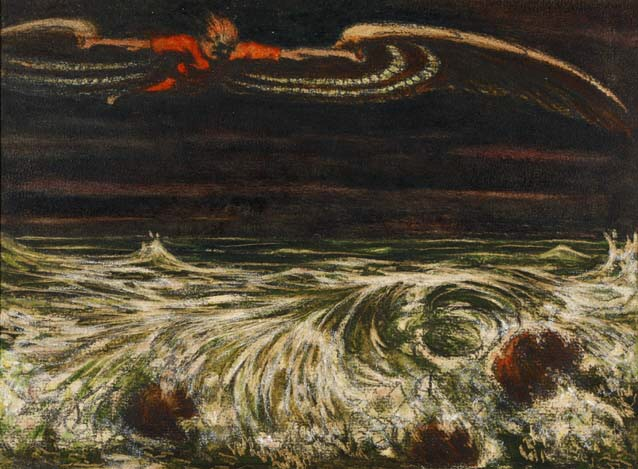 Schmied Völund; Pastellkreide auf Papier, 21.3 x 27.5 cm, Kunstmuseum Luzern (Inv.-Nr. 2006.120y)